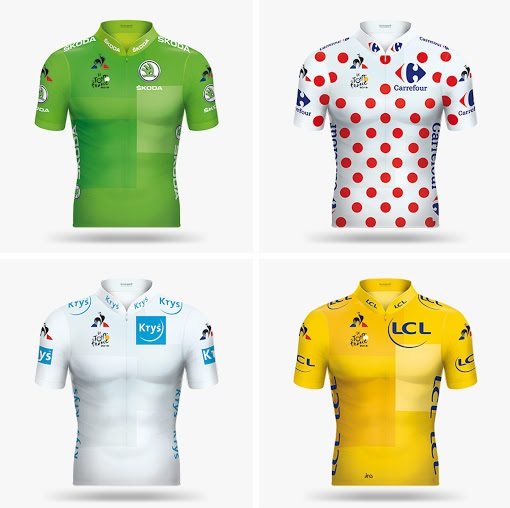 frantziako tourreko sailkapenen maillot guztiak